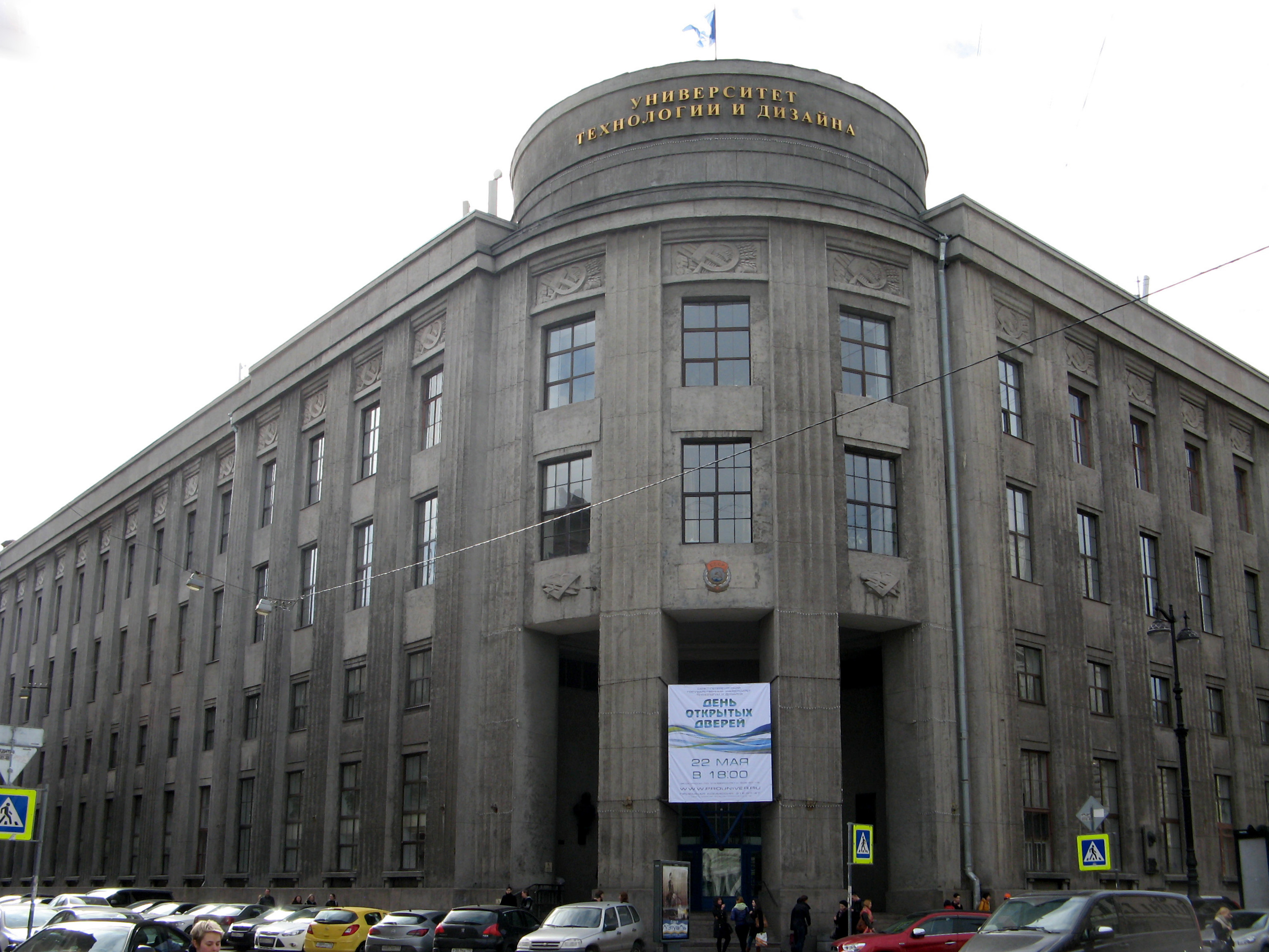 Здание Русского для внешней торговли банка, Санкт-Петербург